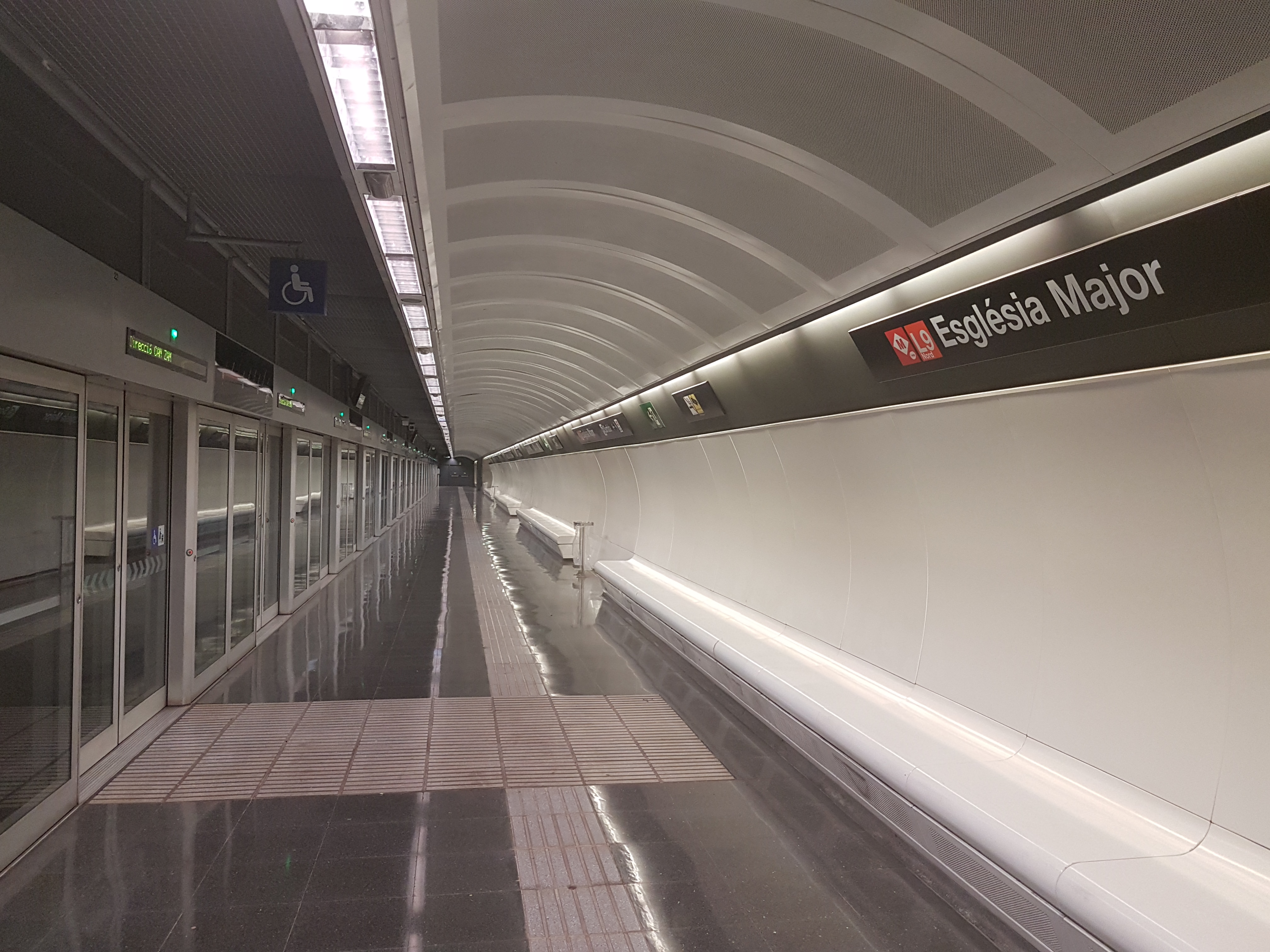 Estació d'Església Major de la L9 del metro de Barcelona